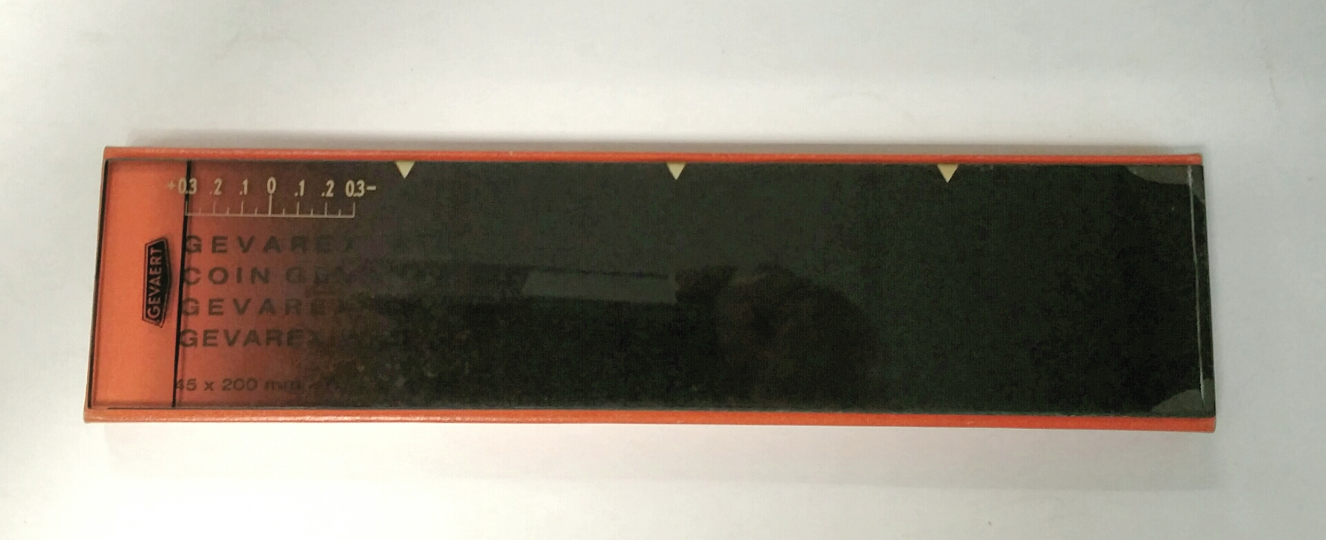 Coin de Goldberg de la marque Gevaert posé sur sa boite